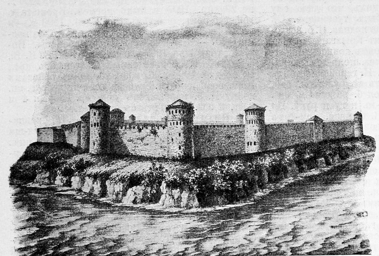 Вид Иван-Городской крепости. Это изображение было использовано для иллюстрирования статьи «Иван-Город» опубликованной в десятом томе «Военной энциклопедии», который был издан книгоиздательским товариществом И. Д. Сытина в 1912—1913 гг. в столице Российской империи городе Санкт-Петербурге.